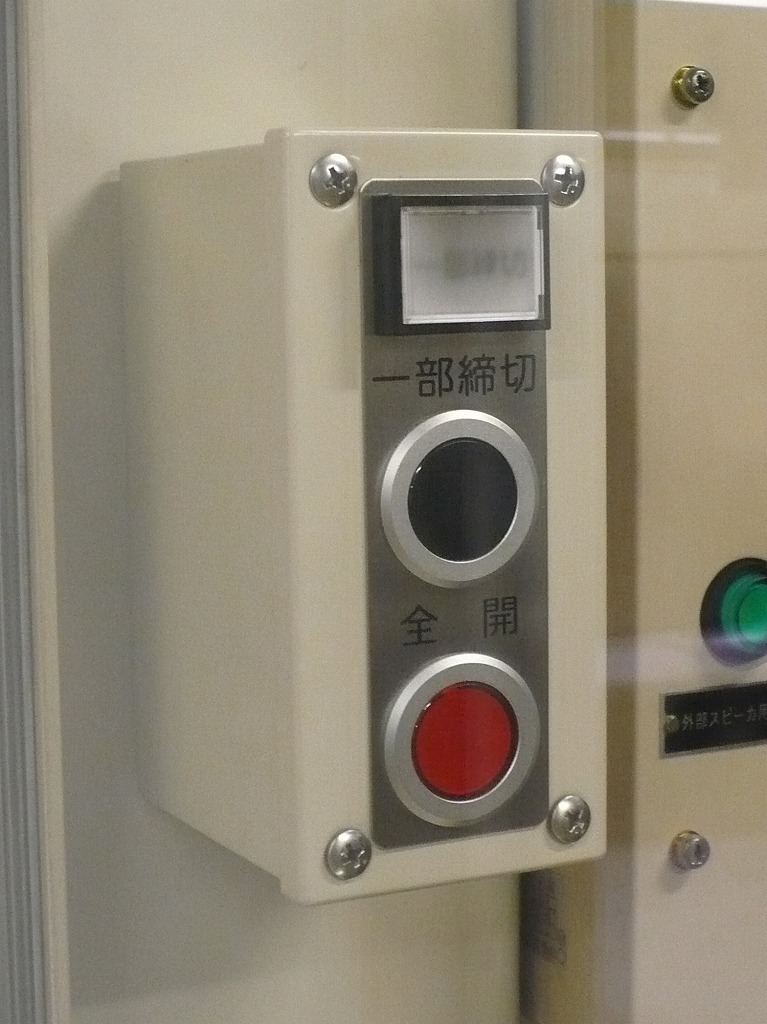 東京地下鉄10000系モニタ